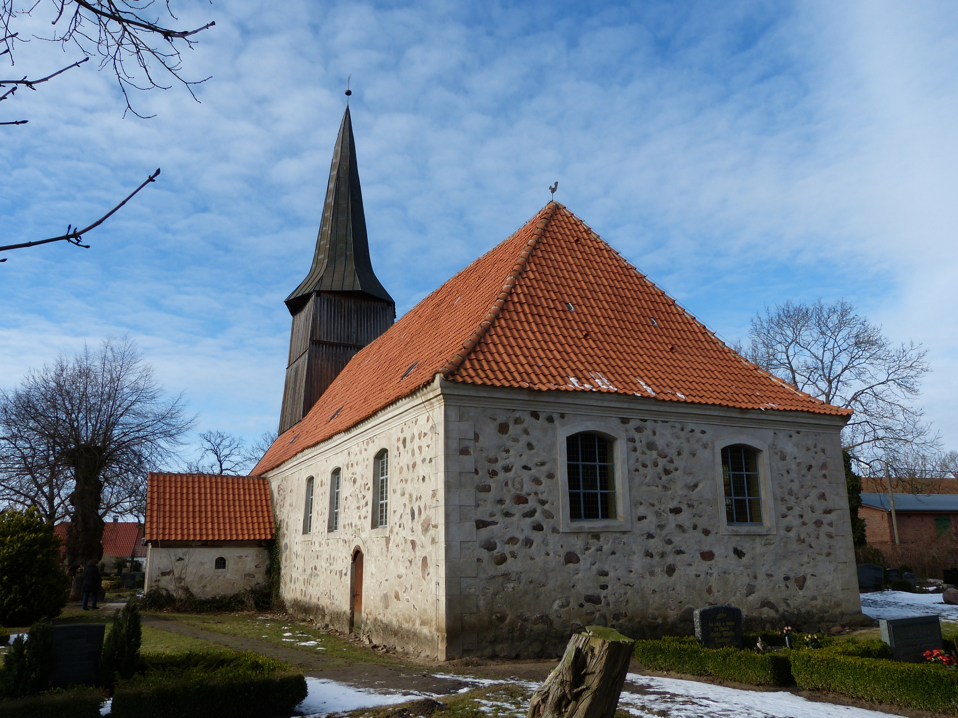 Iven, Kirche, Ostgiebel